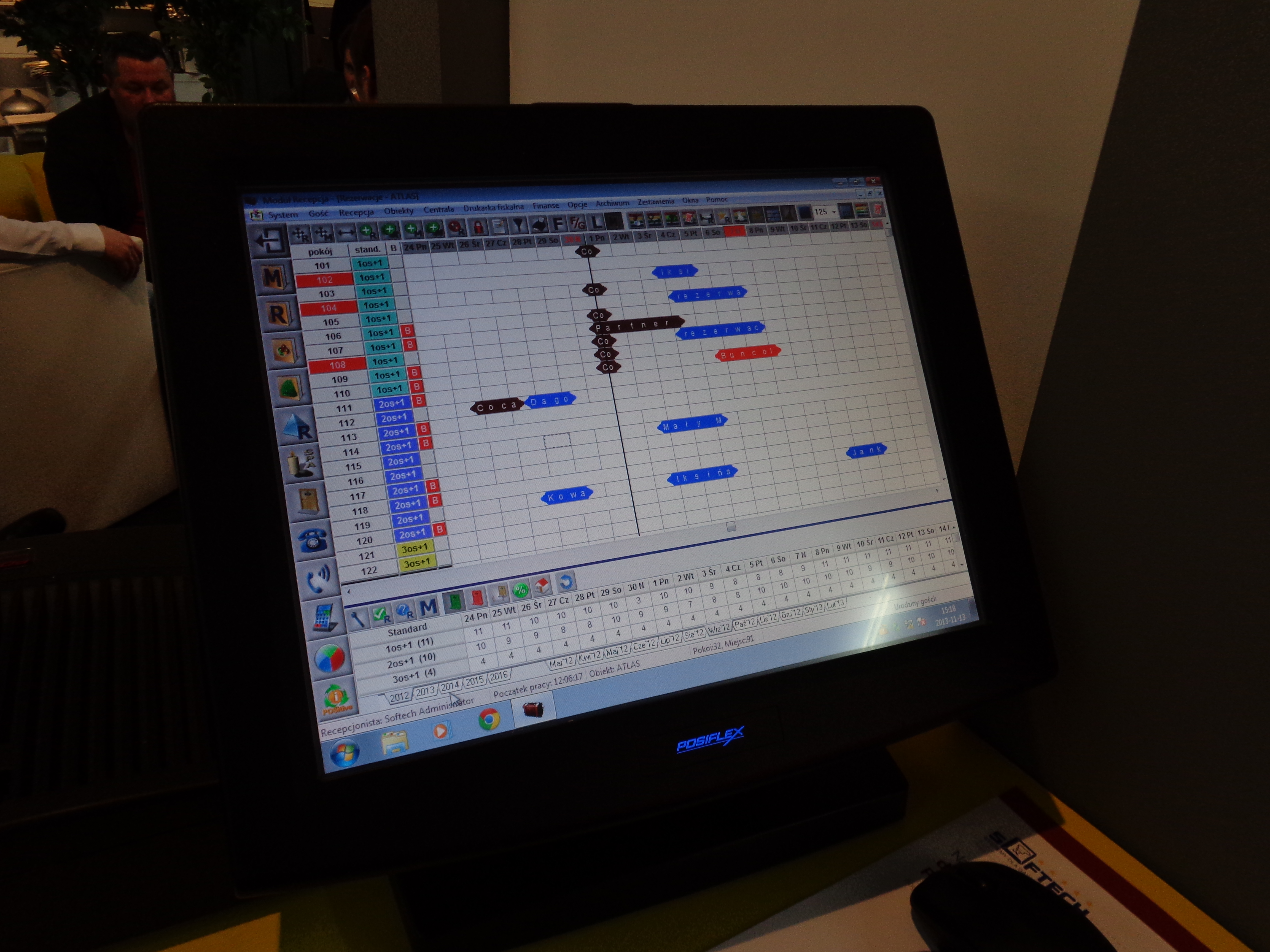 System recepcyjny prezentowany podczas Targów HORECA 2013 w Krakowie.